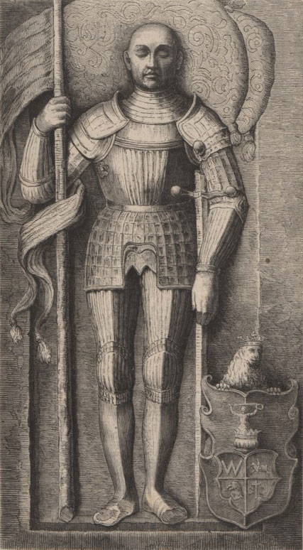 Беларуская (тарашкевіца): Альбэрт Гаштольд